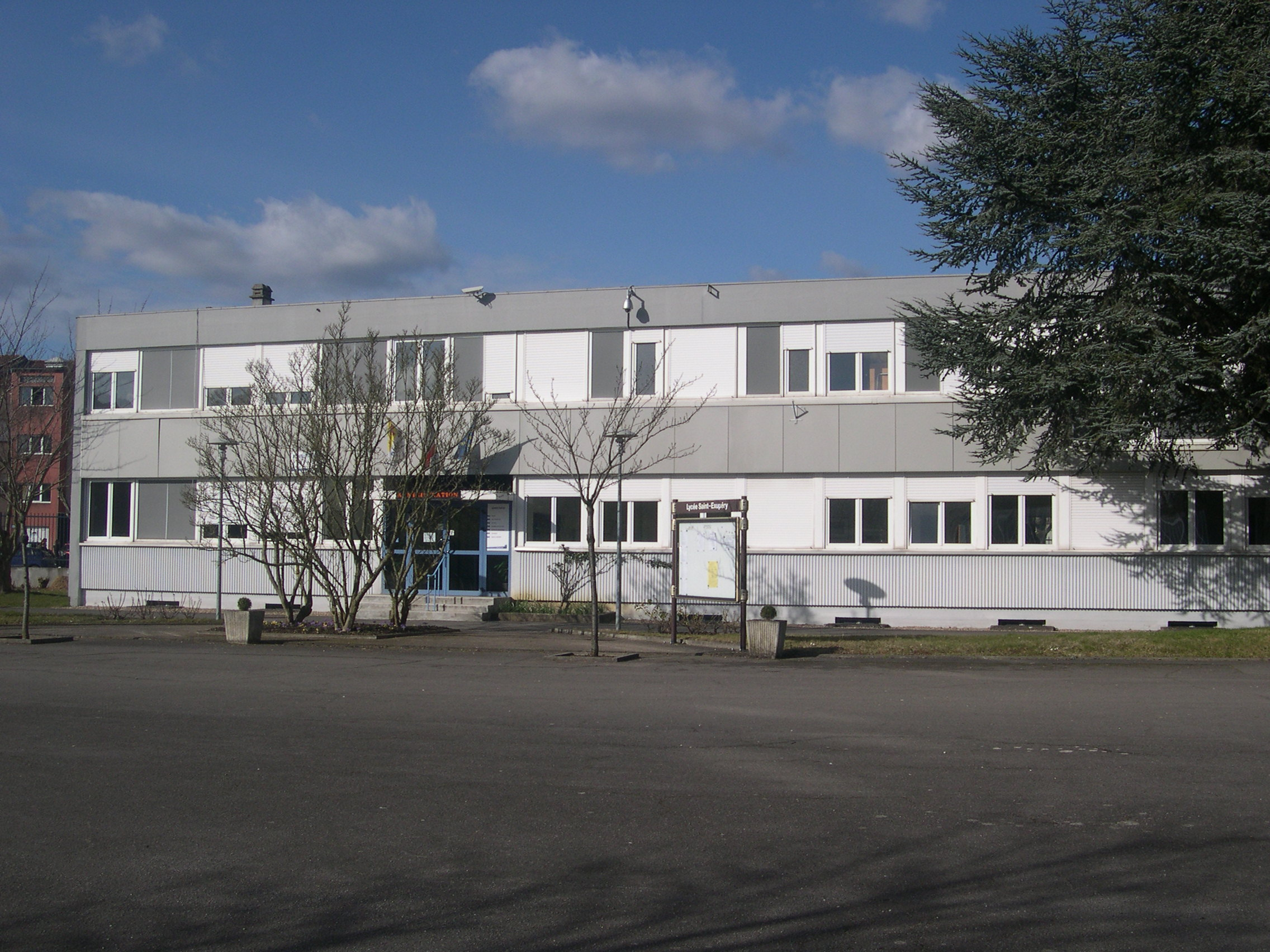 Administration du lycée St Exupéry.